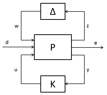 Komplettes System mit Regler, Strecke und Unsicherheitsmatrix in LFR-Darstellung